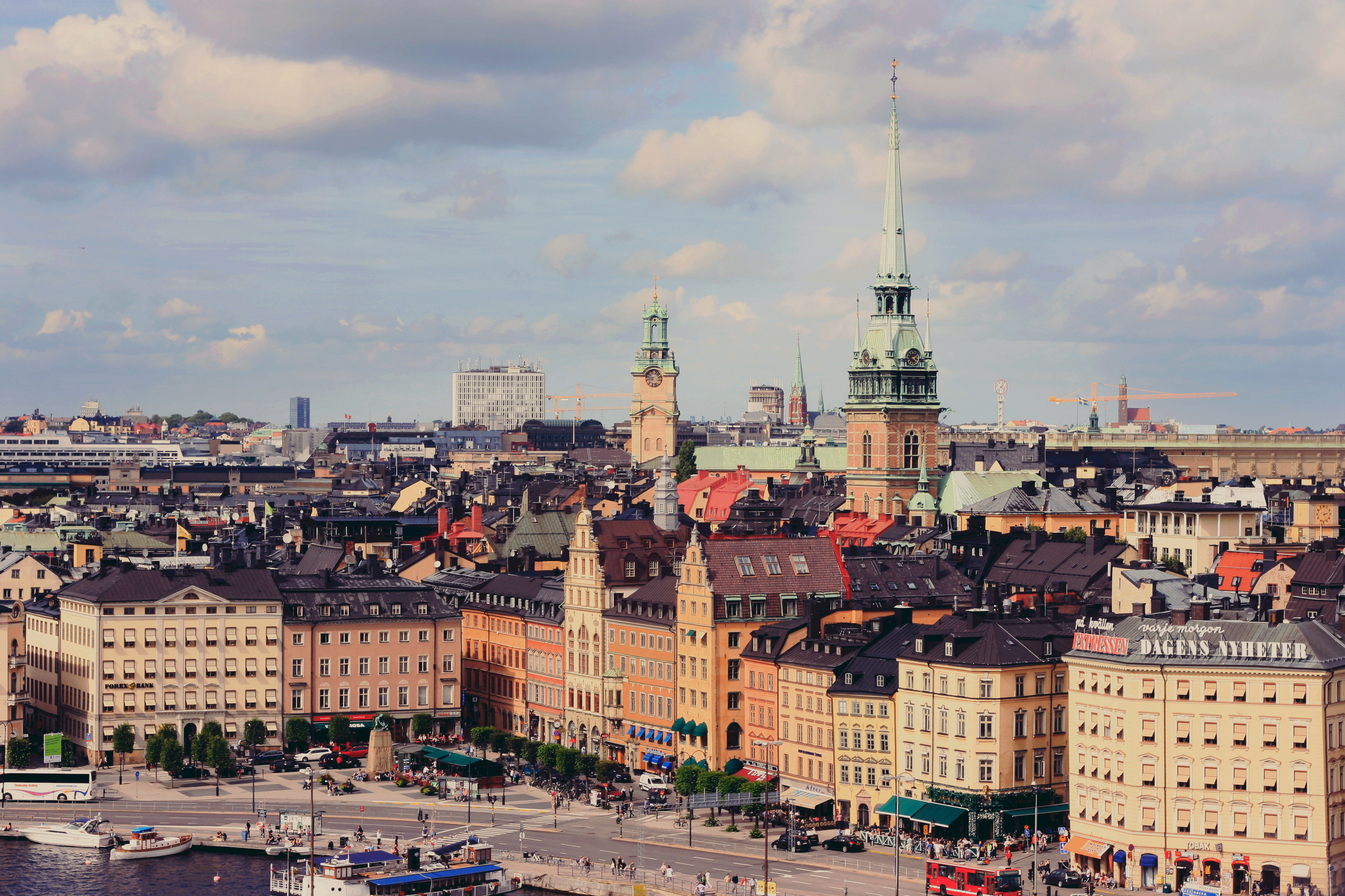 Klasika urba placo, de supre.